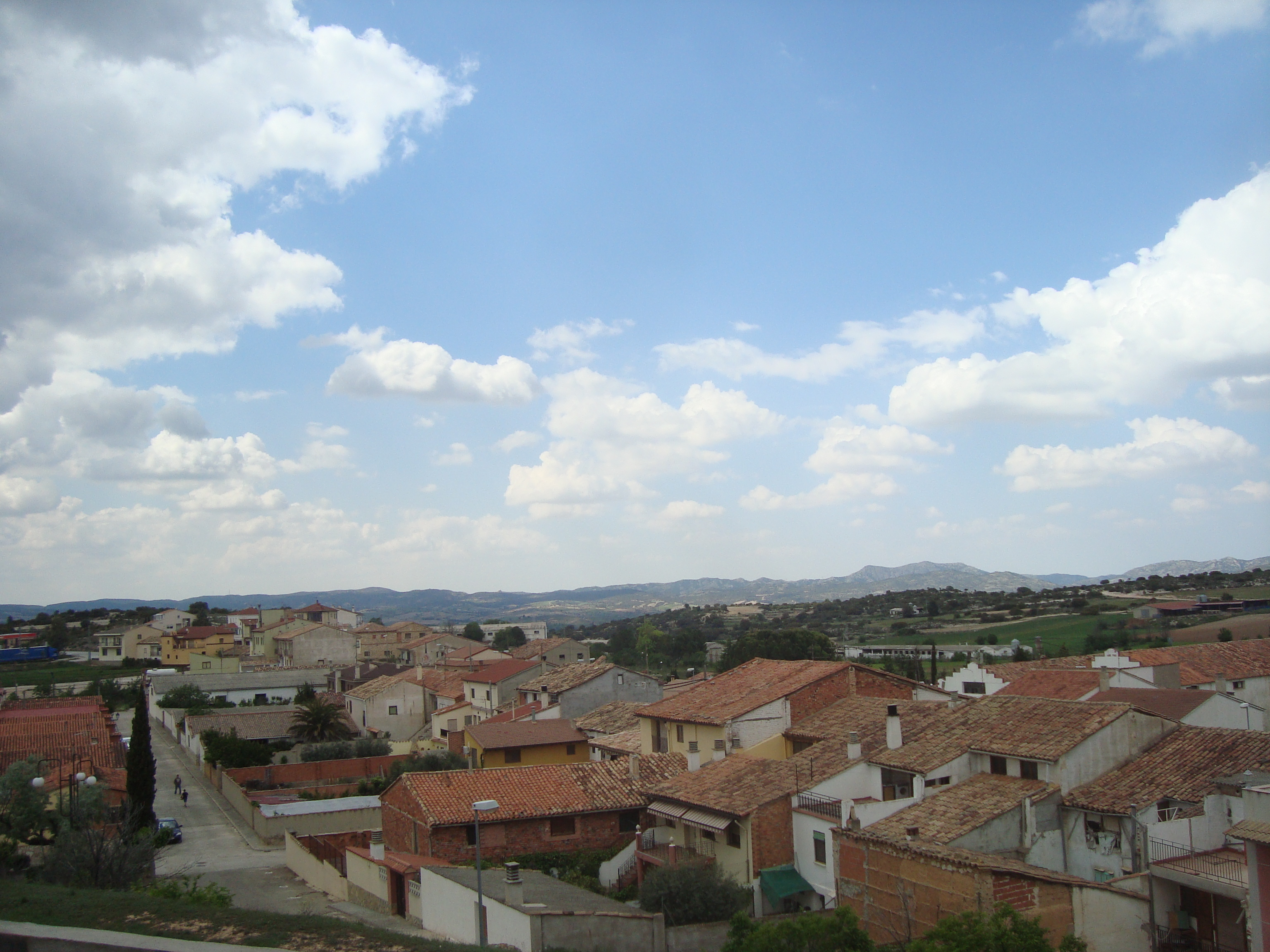 Panorámica de Aguaviva (Teruel)